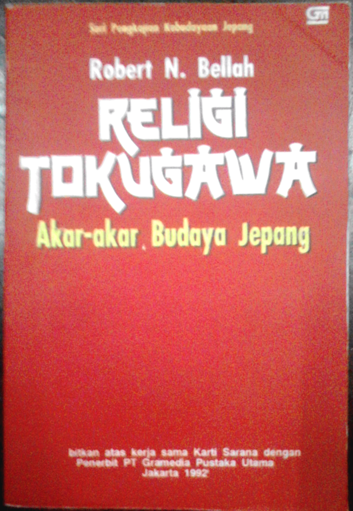 This book is created by Robert Neelly Bellah. This book has already translated to bahasa.